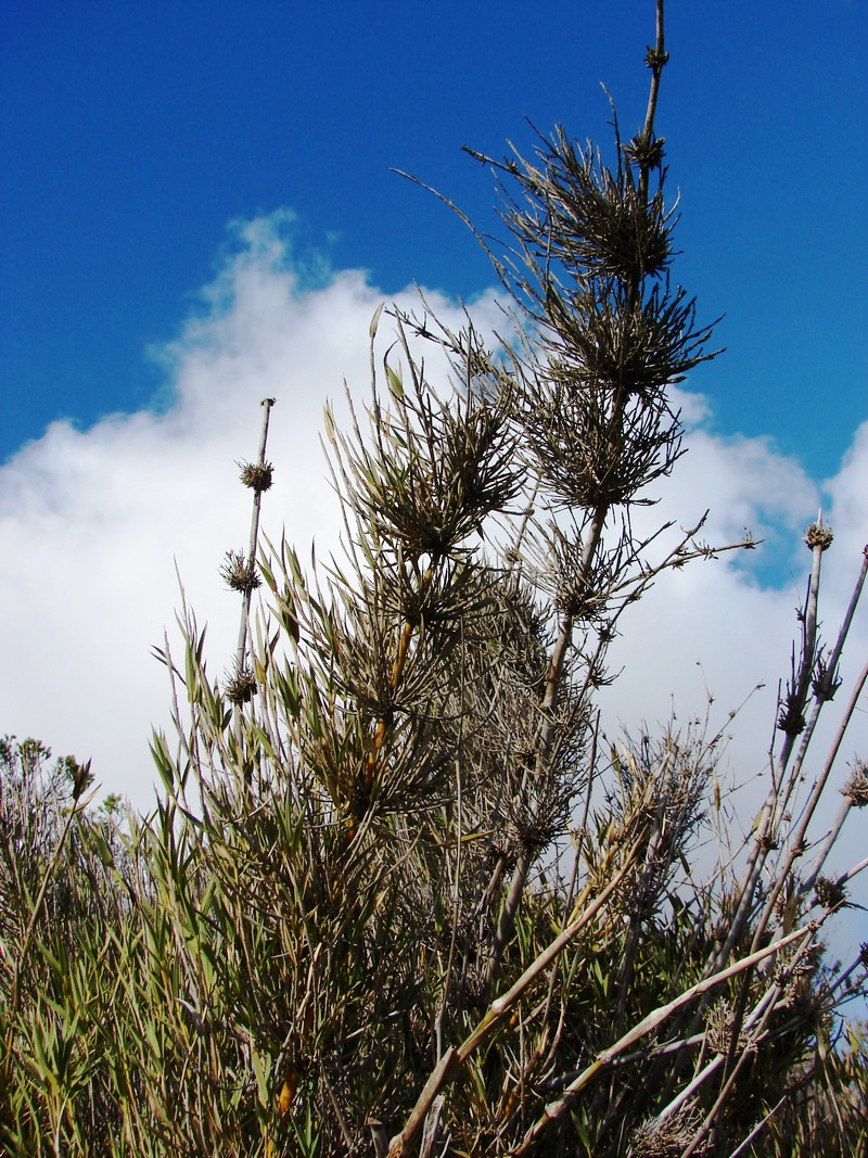 Chusquea cumingii, otoño en el cerro Talinay, al sur de Huentelauquén, región de Coquimbo. No hay colectas de C. cumingii entre el fundo Palo Colorado (sur de Los Vilos), por el sur, y Fray Jorge por el norte, sin embargo es posible encontrar matas en todos los cerros costeros de mas de 700 mts, que alcanzan el umbral de disminución térmica que genera neblinas o camanchaca la cual condensa en la vegetación. En este caso C. cumingii creciendo en el cerro Talinay al sur de Huentelauquén.